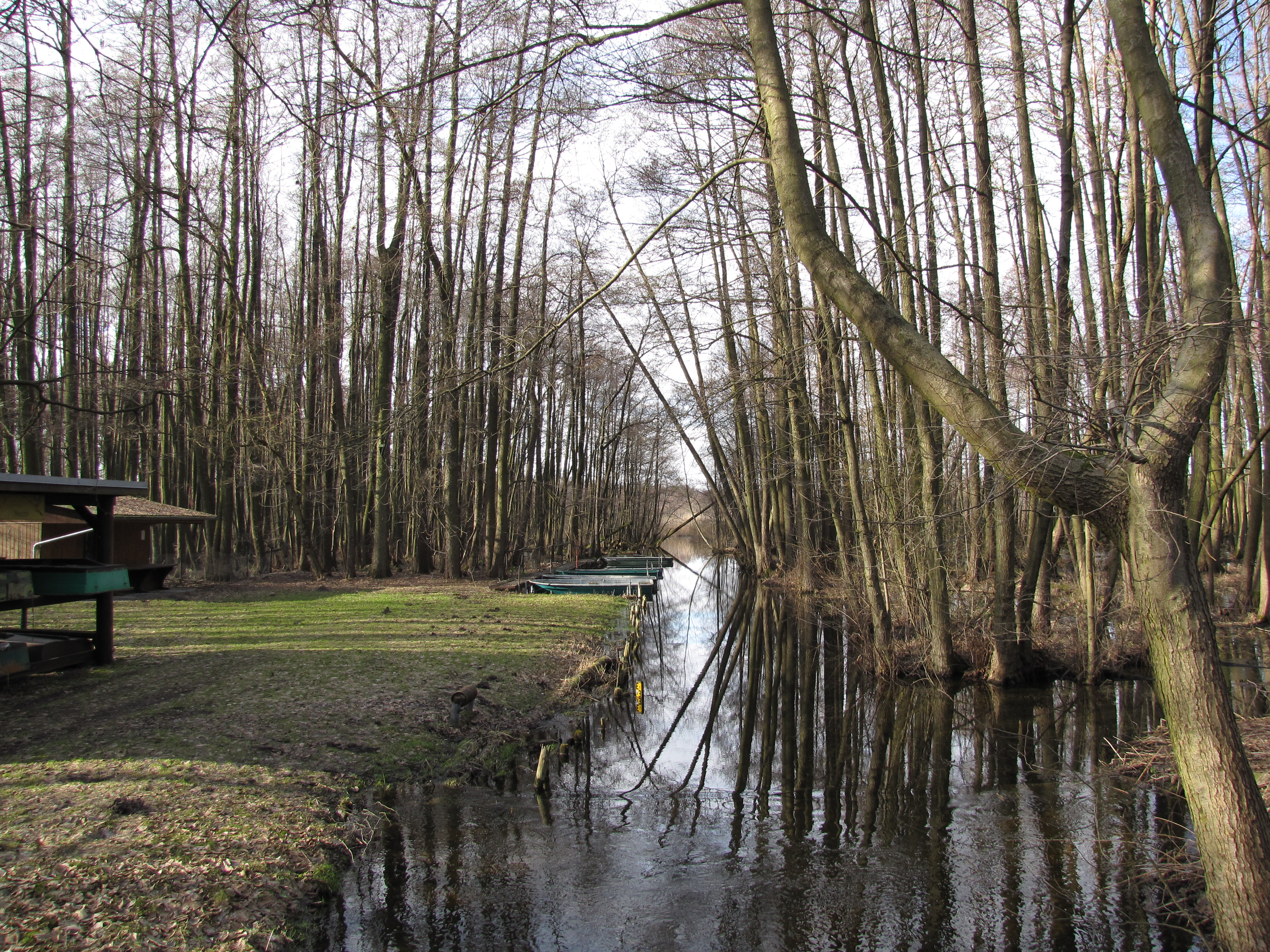 Groß Machnower See, Anglerheim und Bootsanleger am Ostufer, Groß Machnow, Gem. Rangsdorf, Brandenburg